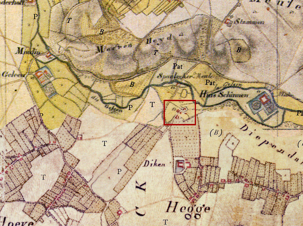 Compilatie van twee aan elkaar grenzende Tranchotkaarten uit 1803 ter plekke van het gehucht Oude Kerk te Spaubeek, Nederland Andere versie: Image:Compilatie Tranchot Huis Ten Dijcken02.jpg